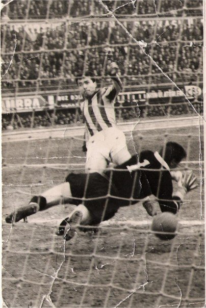 Yüksel Gündüz Fenerbahçe forması ile Beşiktaş filelerini havalandırırken (25.12.1960'taki maç).